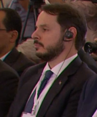 Enerji ve Tabii kaynaklar Bakanı Berat Albayrak